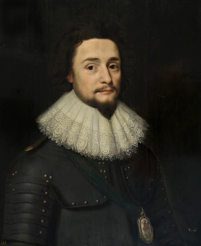 Kurfürst Friedrich V mit englischem Hosenbandorden